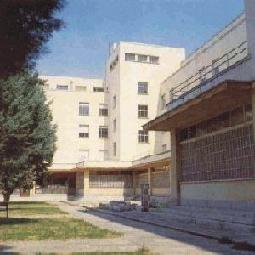 Fachadas traseras de la Escuela Técnica Superior de Arquitectura de Madrid (España).